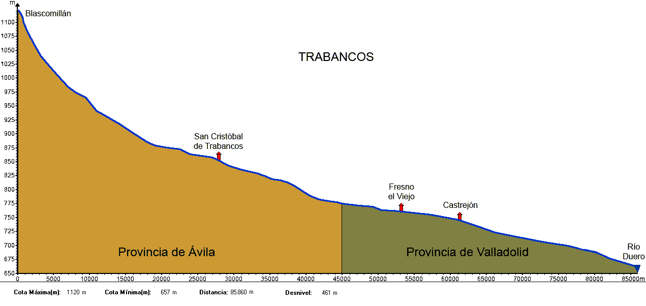 Perfil del río Trabancos, afluente del Duero